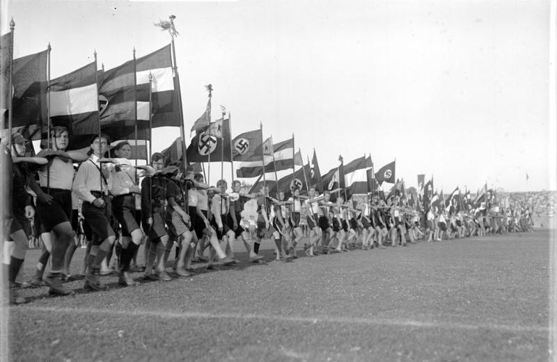 Das große Fest der Deutschen Schule fand unter Teilnahme von über 30.000 Kindern im Berliner Stadion statt! Parademarsch der Fahnen auf dem Fest der Deutschen Schulen im Berliner Stadion.